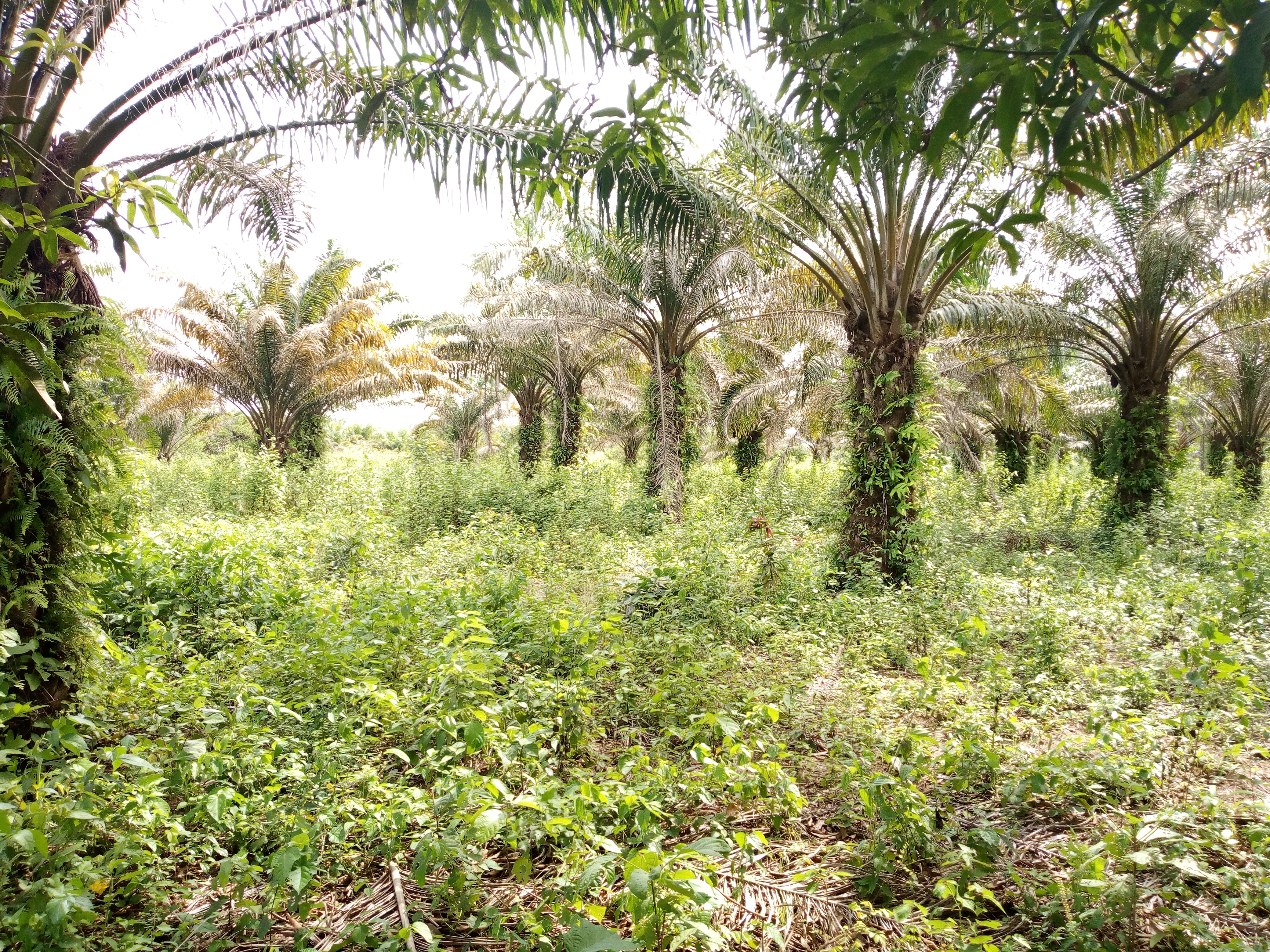 Palmeraie à Glodjigbé Abomey-Calavi benin